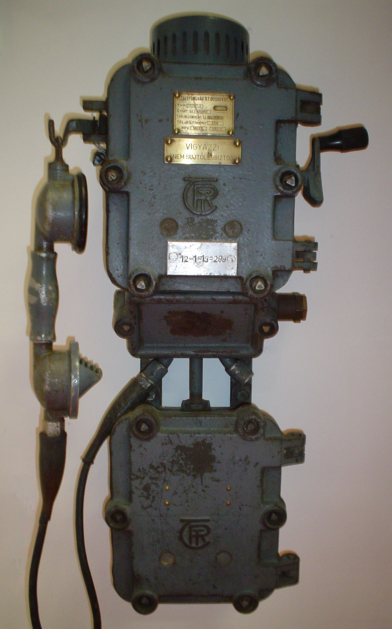 Mineja krankinduktila telefono